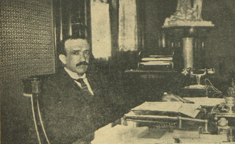 Julián Elorza